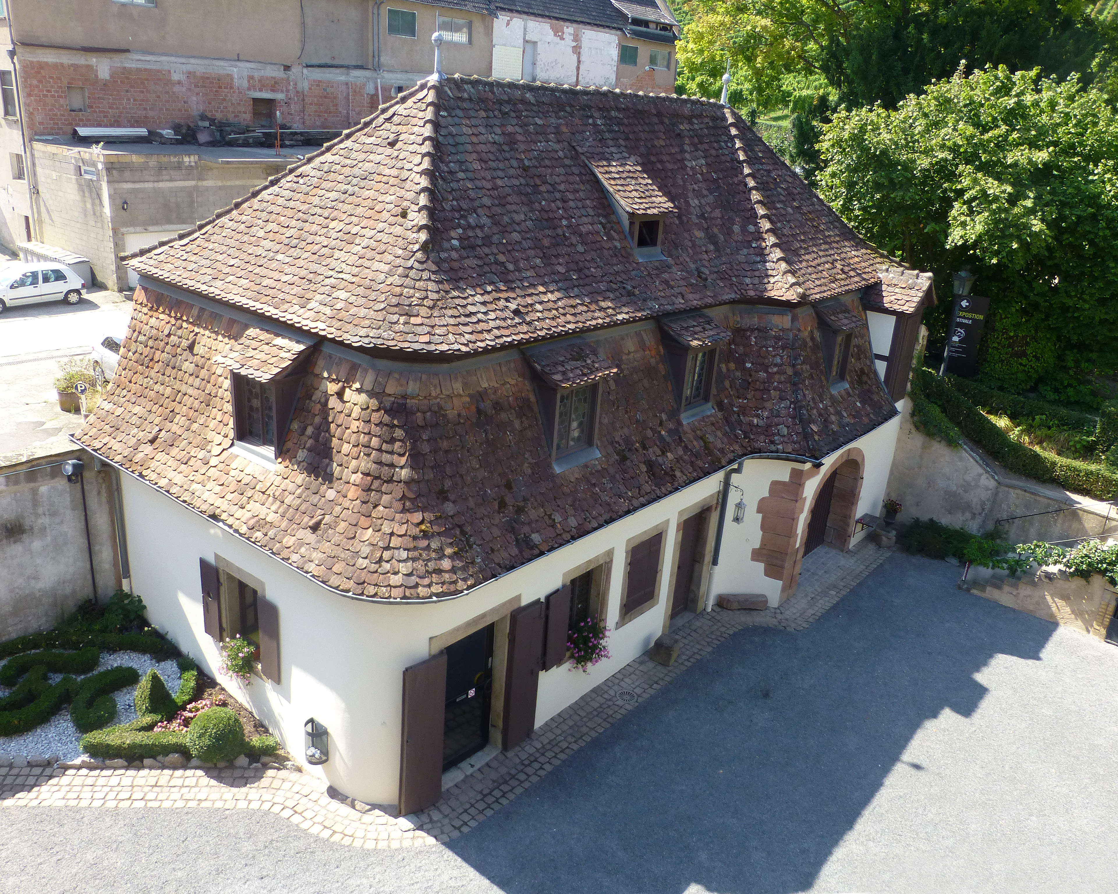 Folie Marco à Barr (Bas-Rhin) : toiture des communs, à la Mansart, à combles brisés ; tuiles alsaciennes à queue de castor (Biberschwanz) ; les toitures des dépendances font partie des éléments protégées par les MH.